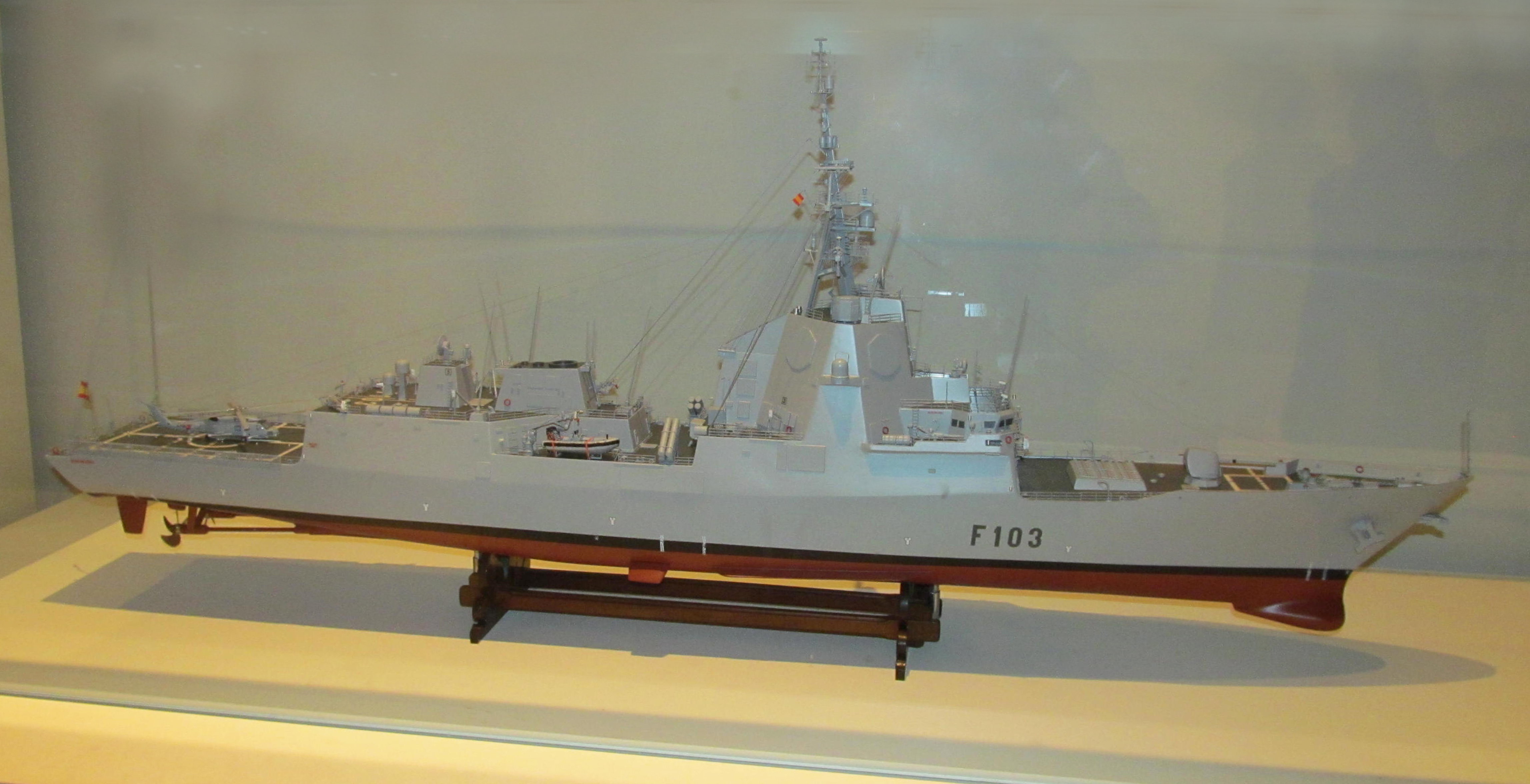 Maqueta de la fragata Blas de Lezo (F-103) expuesta en el Museo Naval, Madrid.